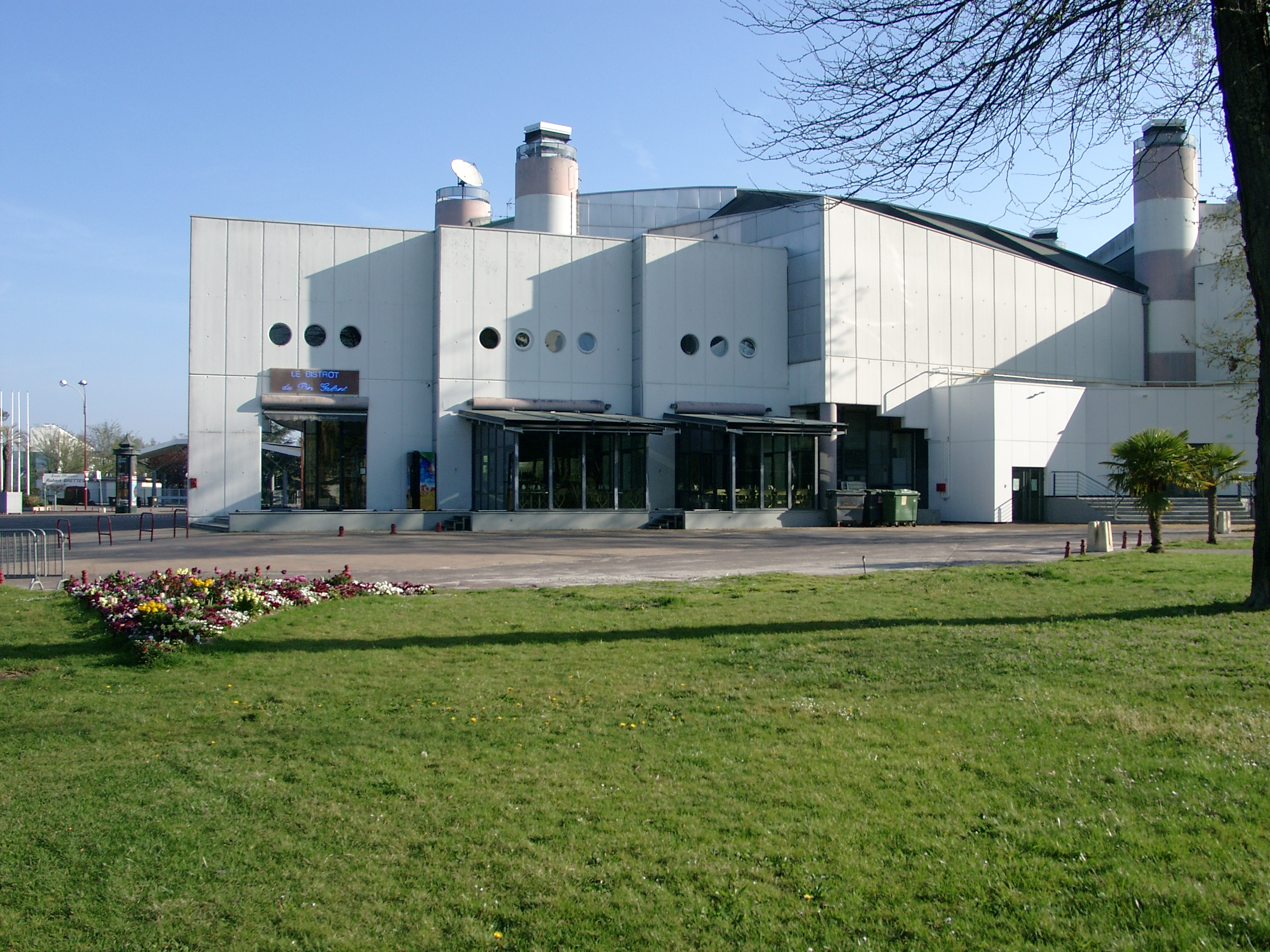 Salle de spectacle Pin Galant à Mérignac (Gironde).